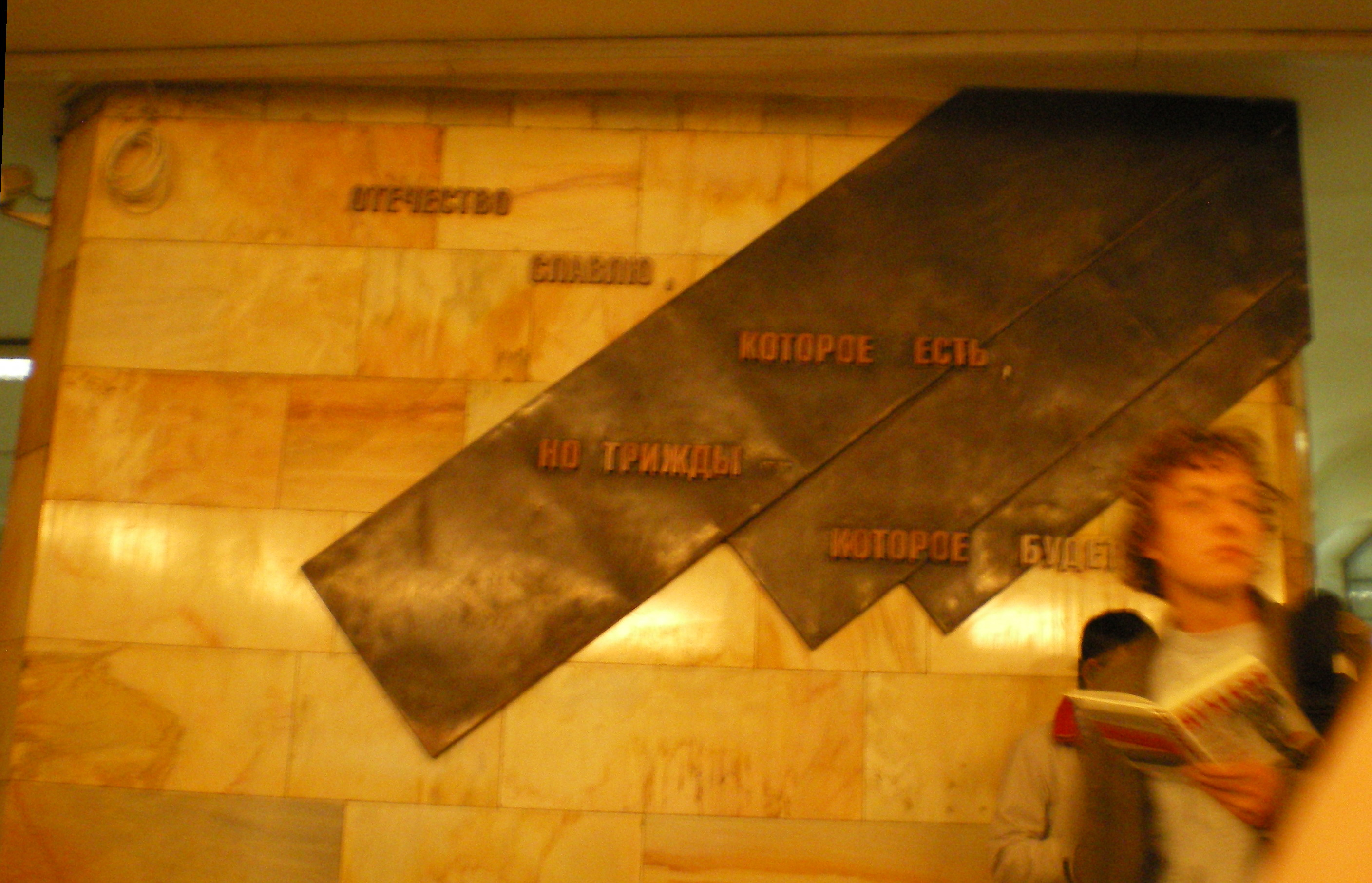 Наземный вестибюль станции «Маяковская», слова поэта на пилоне.